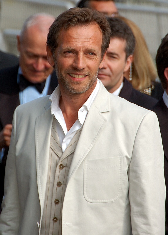 Stéphane Freiss au festival de Cannes